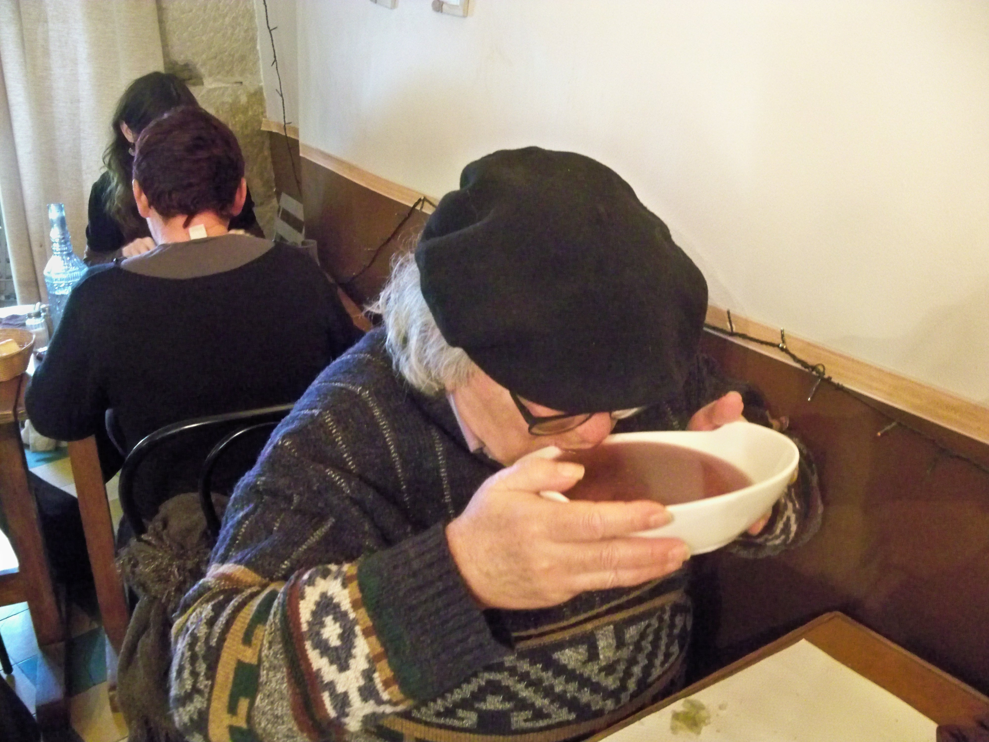 Faire chabrot, tradition de vin dans la soupe, dans le sud de la France